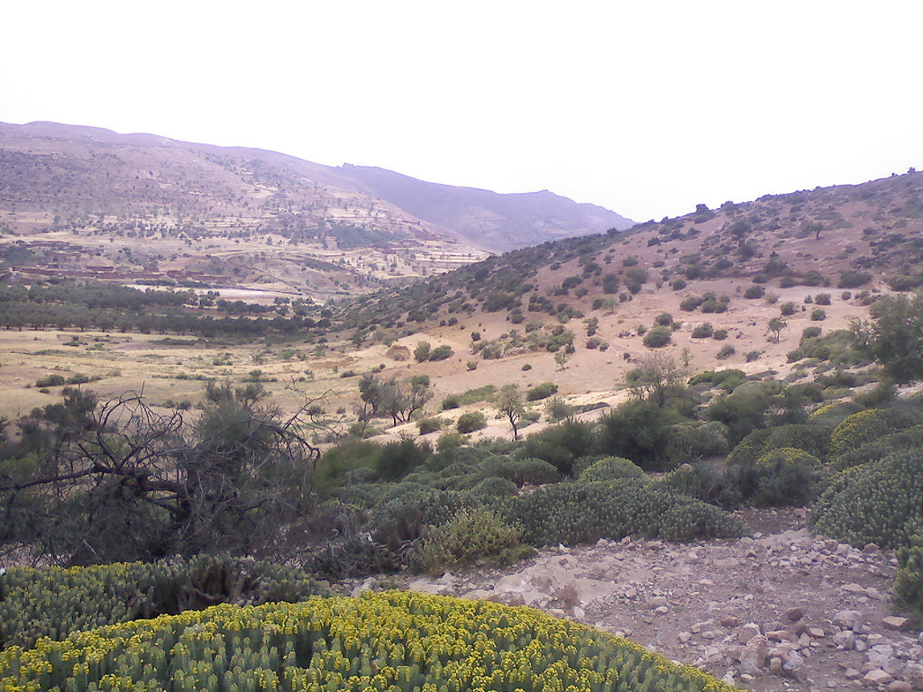 Road to Ouzoud Falls- Cascade d'Ouzoud- Morocco, Beni Mellal -Africa